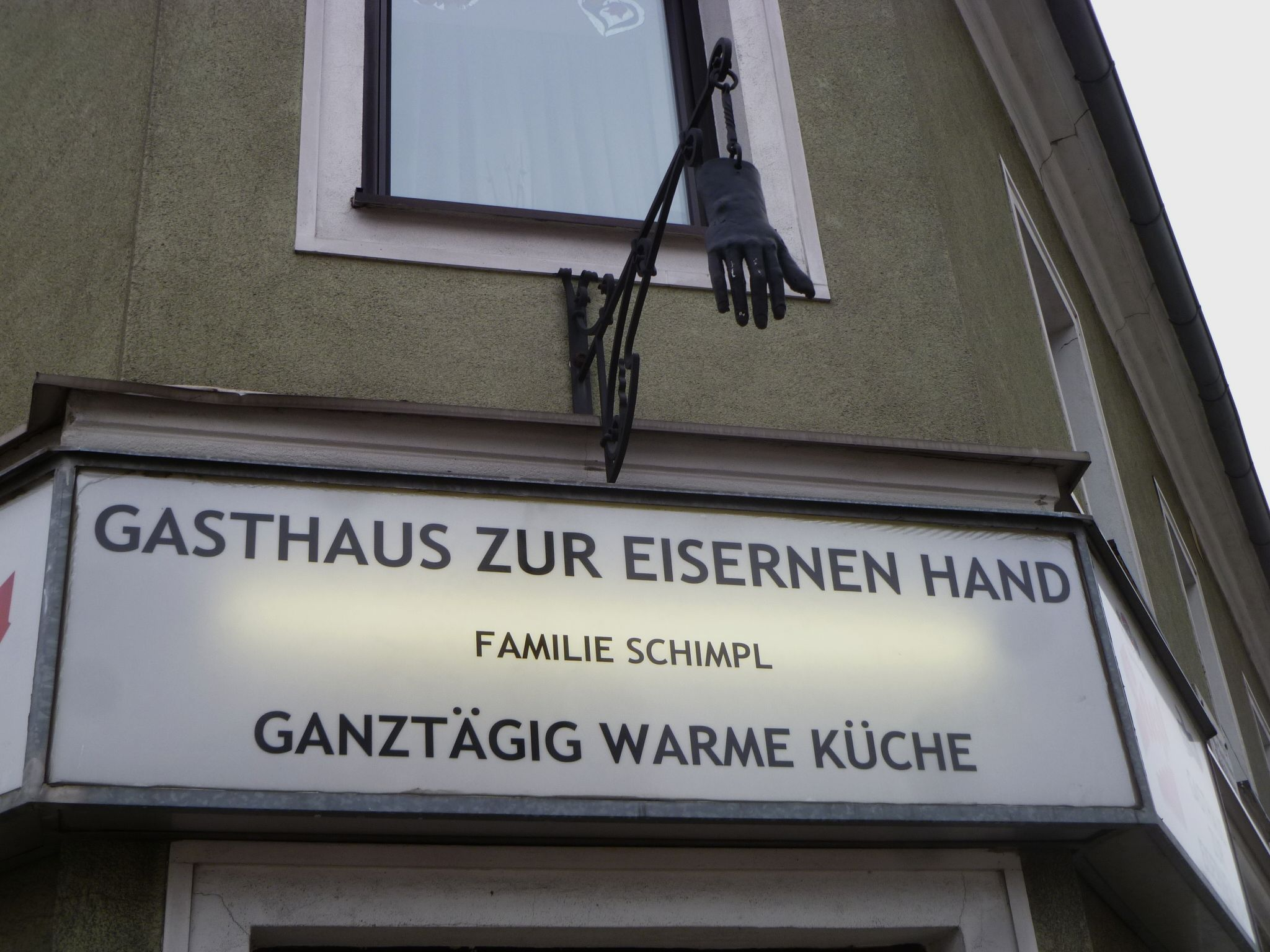 Eiserne_Hand (Linz) Gasthausschild mit Eiserner Hand